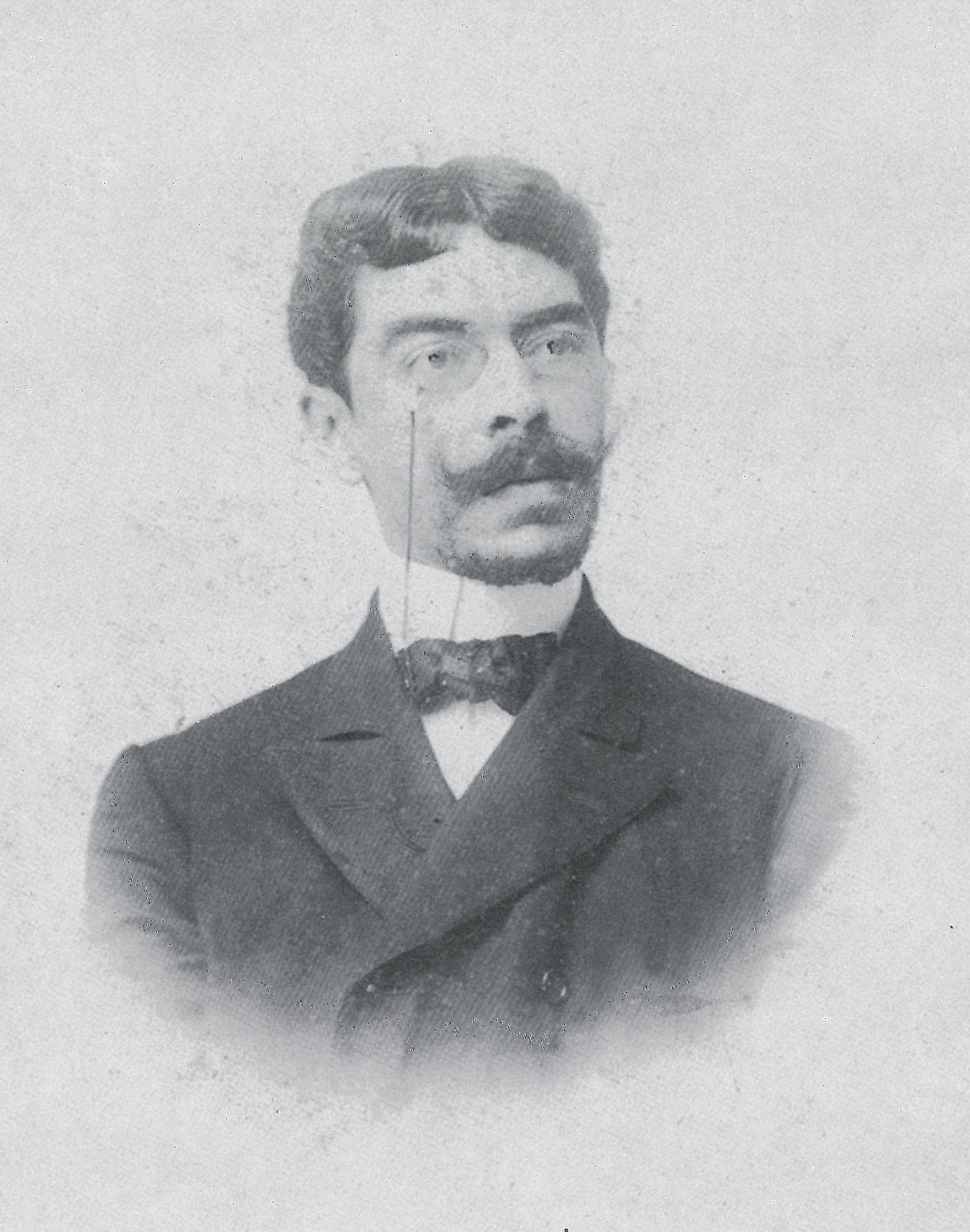 El escritor peruano Clemente Palma